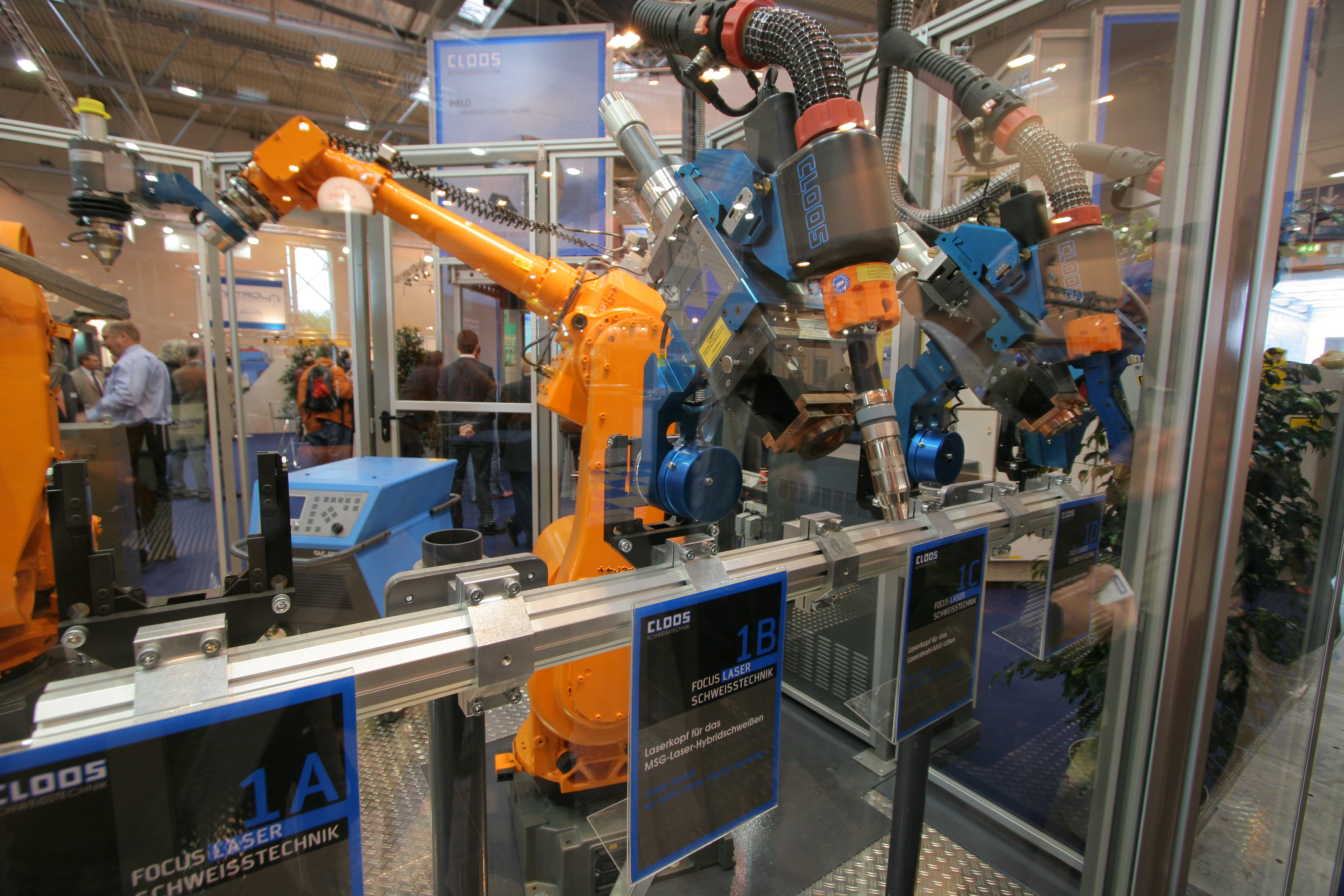 Essen,Welding show